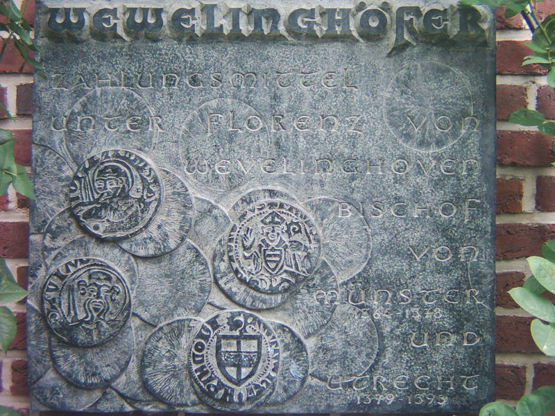 Wewelinghöfer sind westfälische Münzen, die Bischof Florenz von Wevelinghoven (1364 bis 1378 Bischof von Münster), Bruder von Wilhelm von Wevelinghoven, in großen Mengen prägen ließ. Hier eine Gedenktafel aus Wevelinghoven, am Klosterweg.